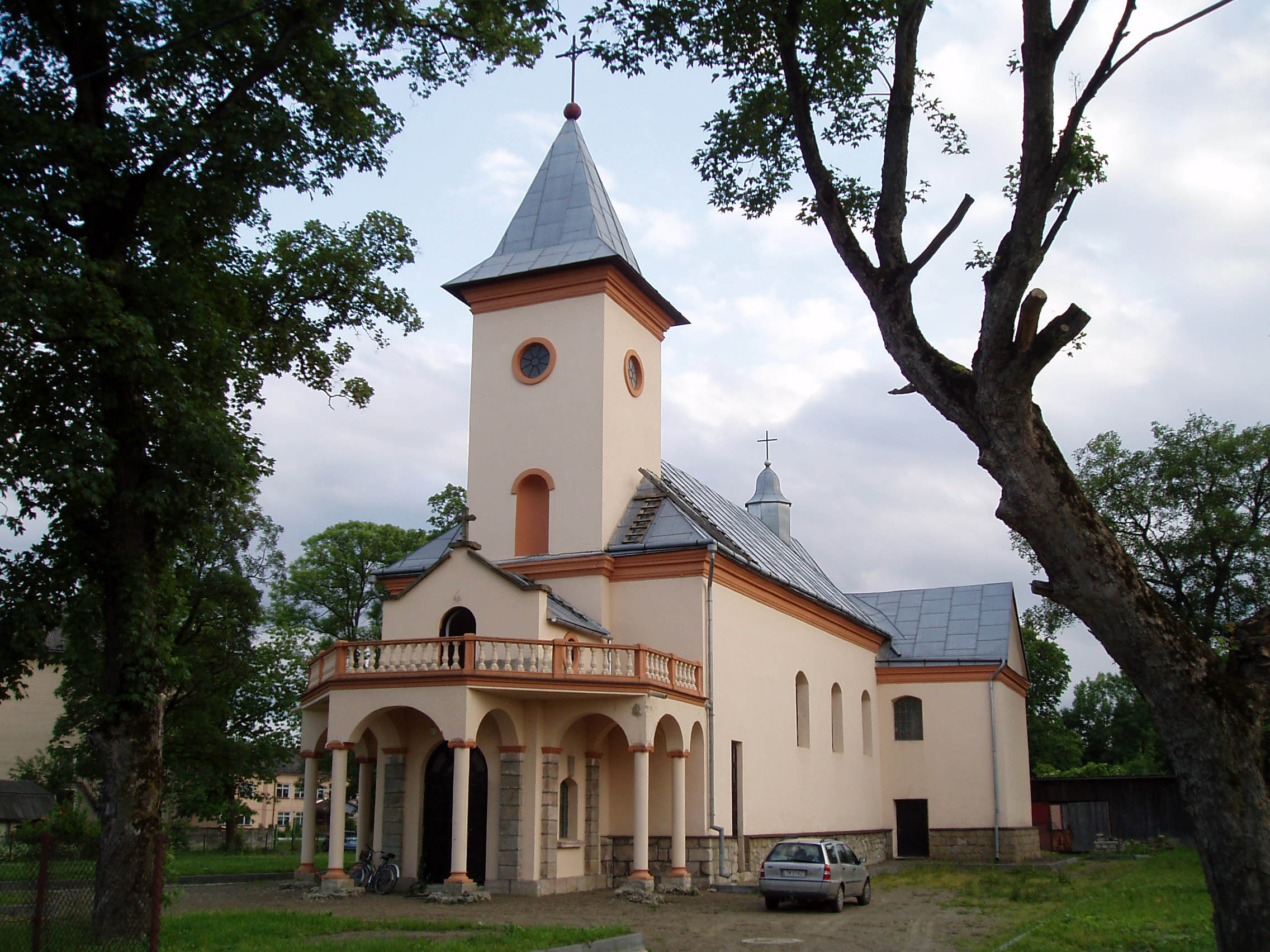 Костел у Болехові.